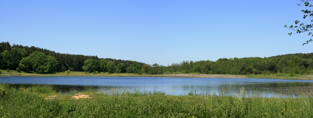 В Яворовском районе Львовской области, Яворовский нац. природный парк